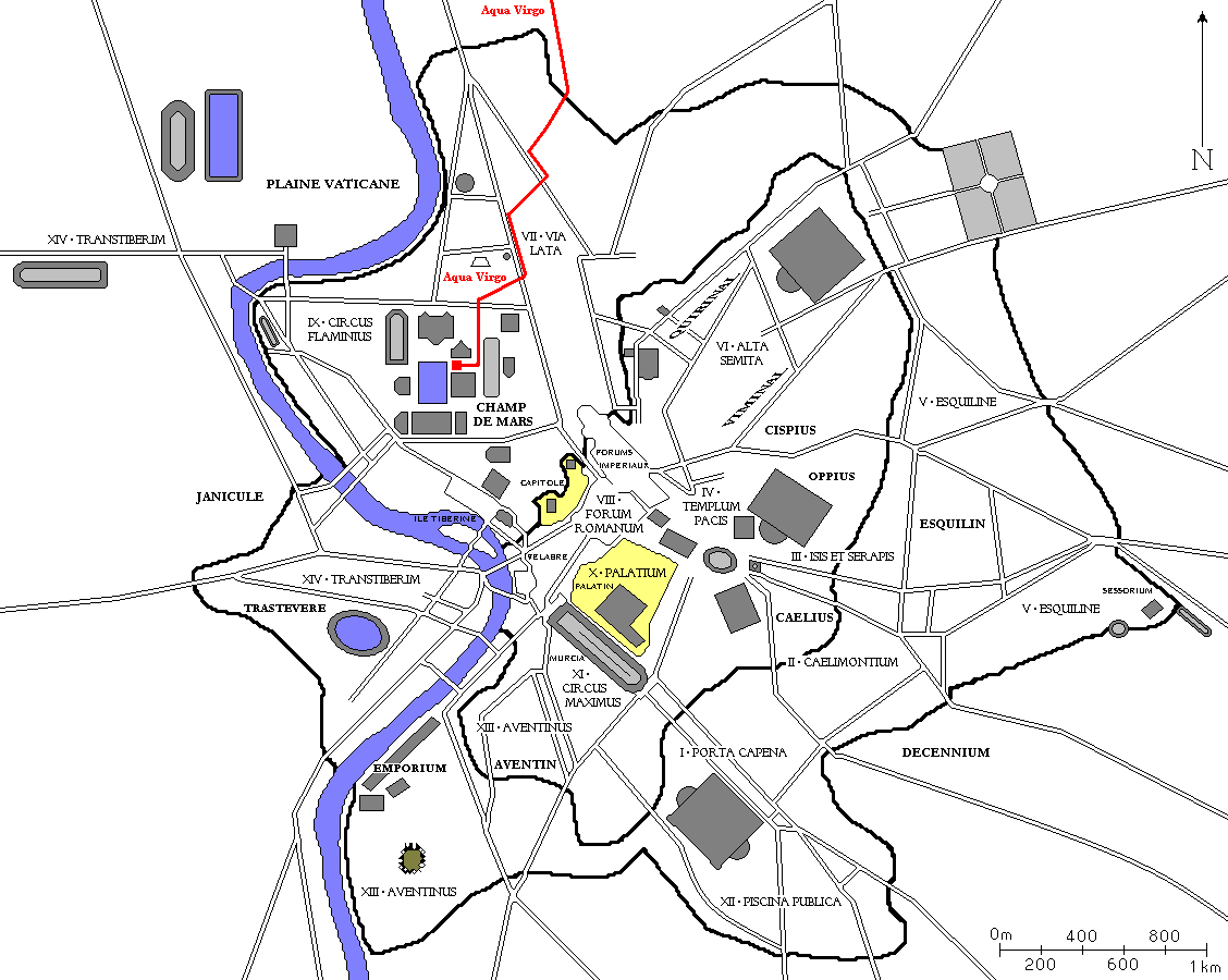 Plan de Rome avec l'Aqua Virgo en rouge.